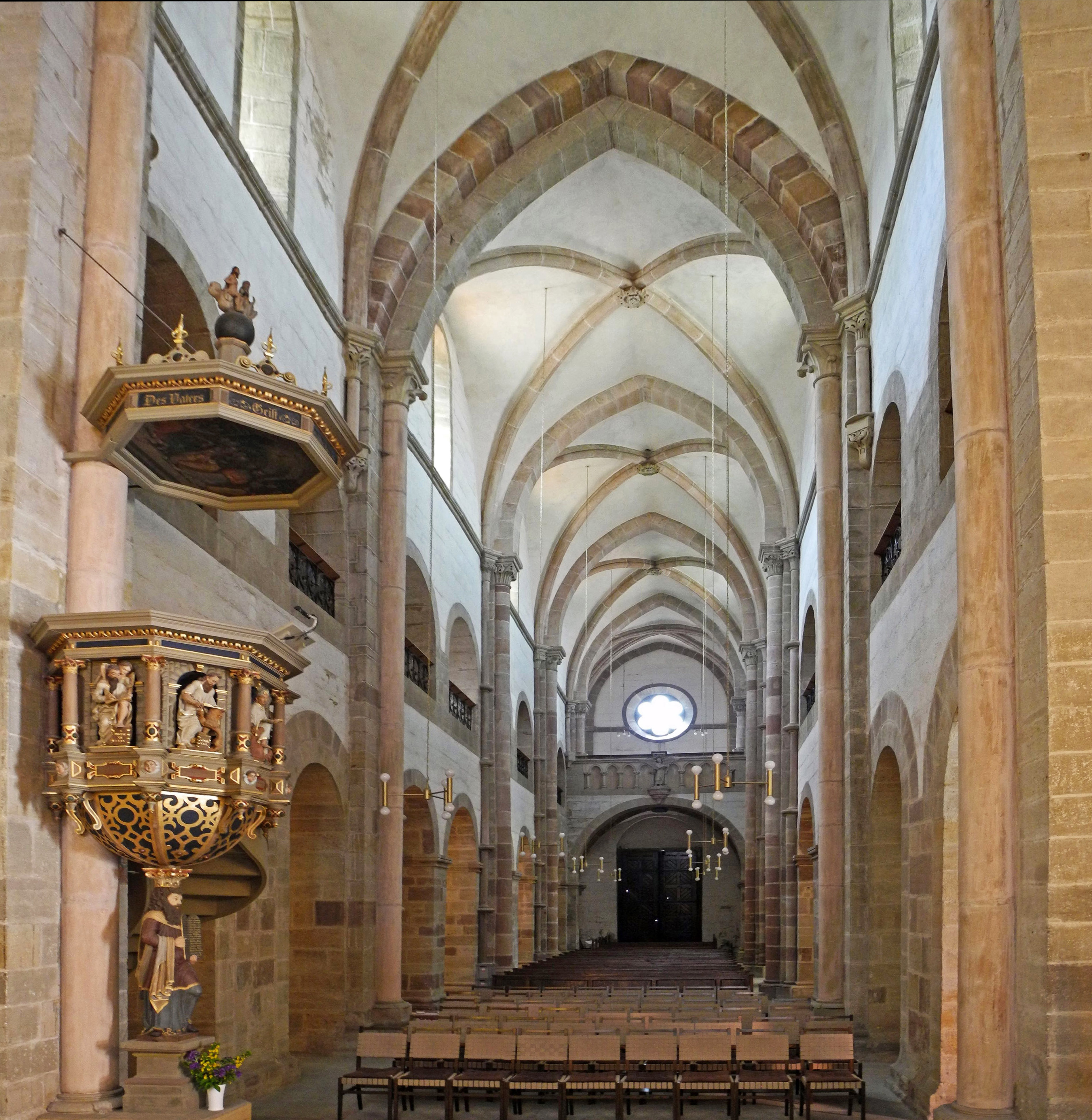 Liebfrauenkirche in Arnstadt - eine Kirche im Übergangsstil von der Romanik zur Gotik, hier das romanische Kirchenschiff mit späterer Einwölbung